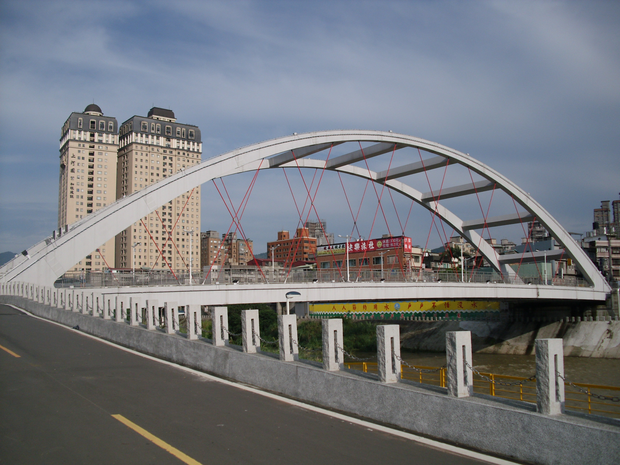 Bân-lâm-gú: 景美橋、梘尾橋，正手爿新北市新店，倒手爿臺北市梘尾。